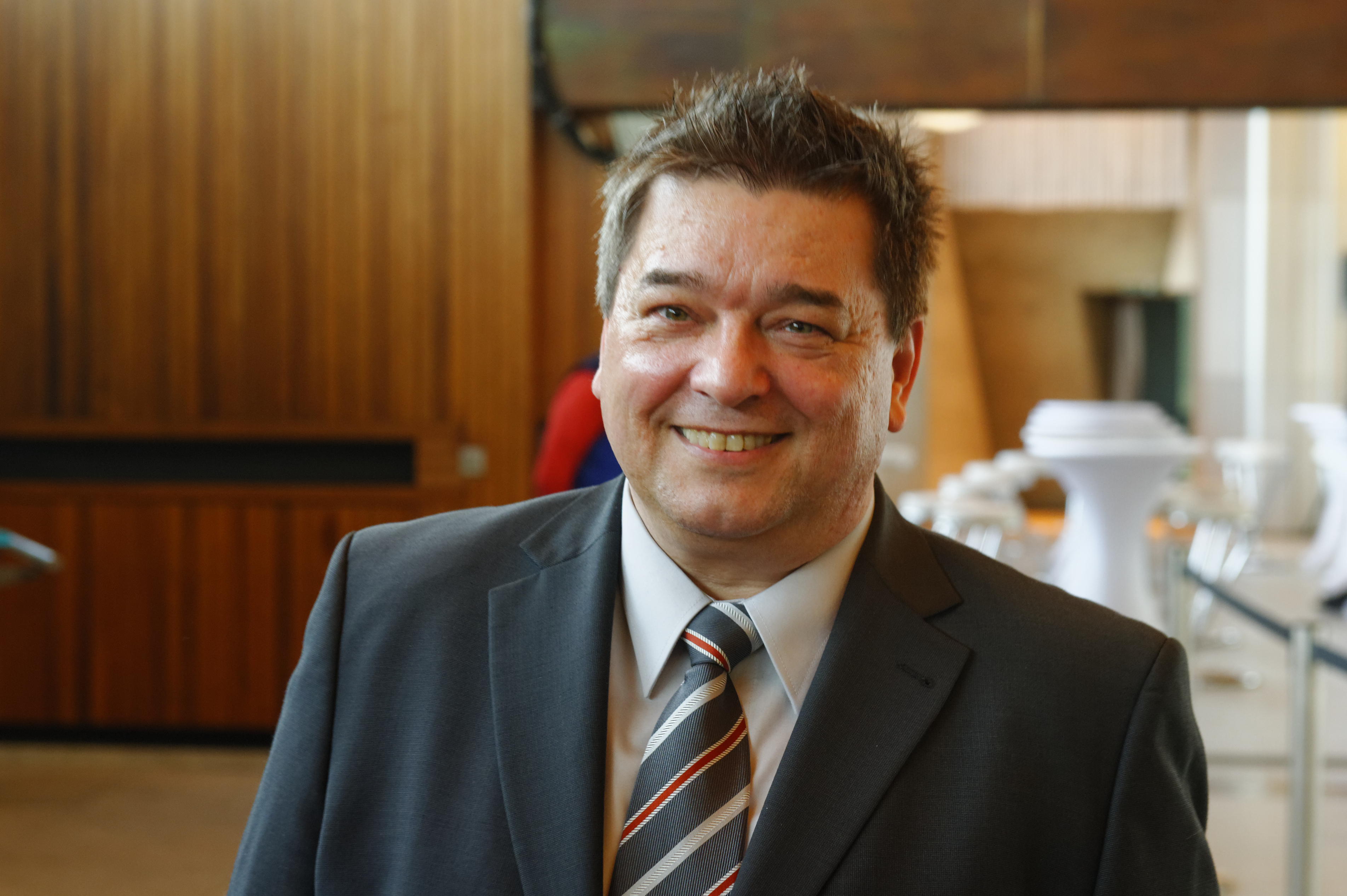 Grimme-Preis 2013 Pressekonferenz und Preisverleihung